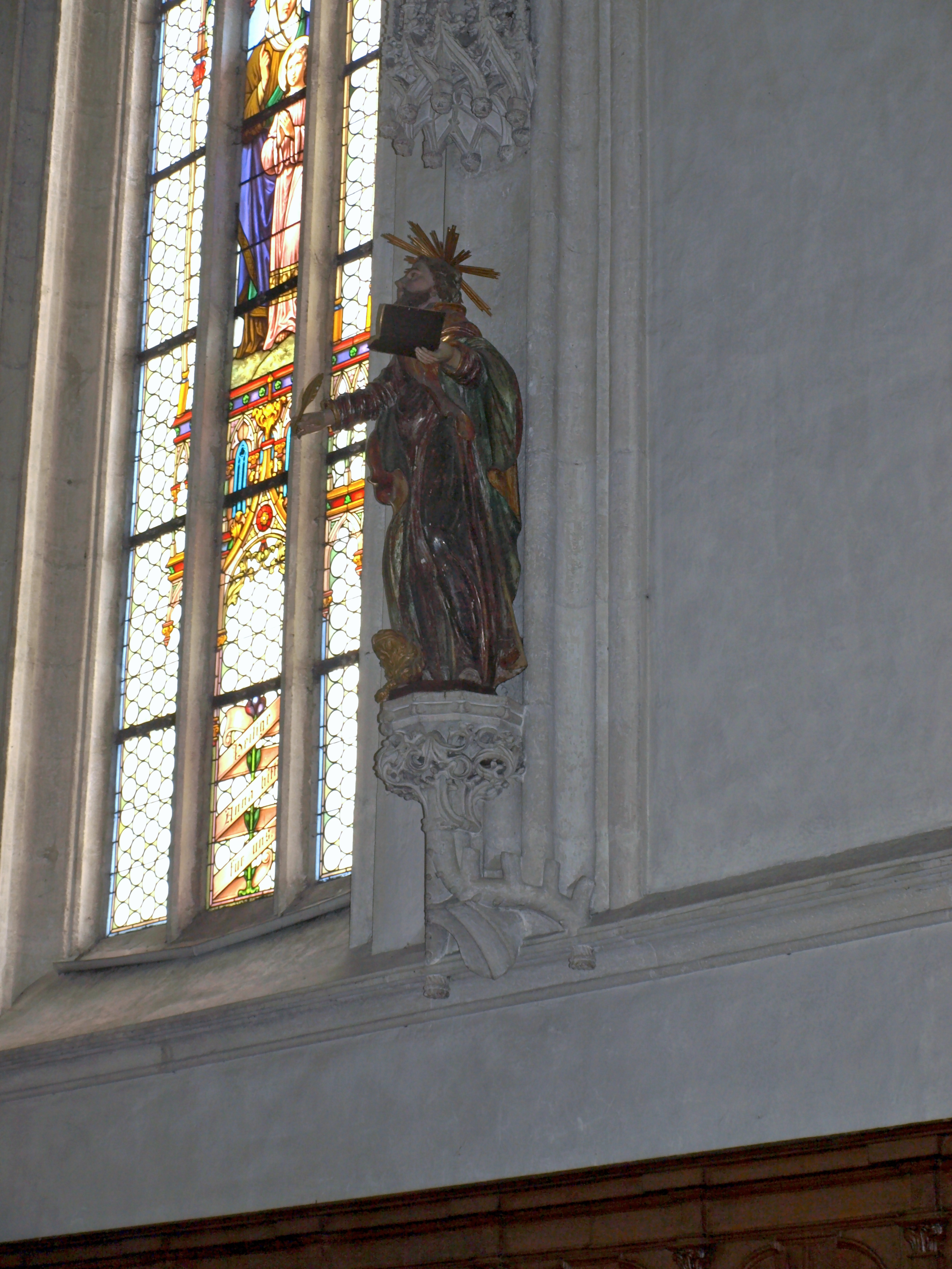 Kath. Pfarrkirche hl. Mauritius